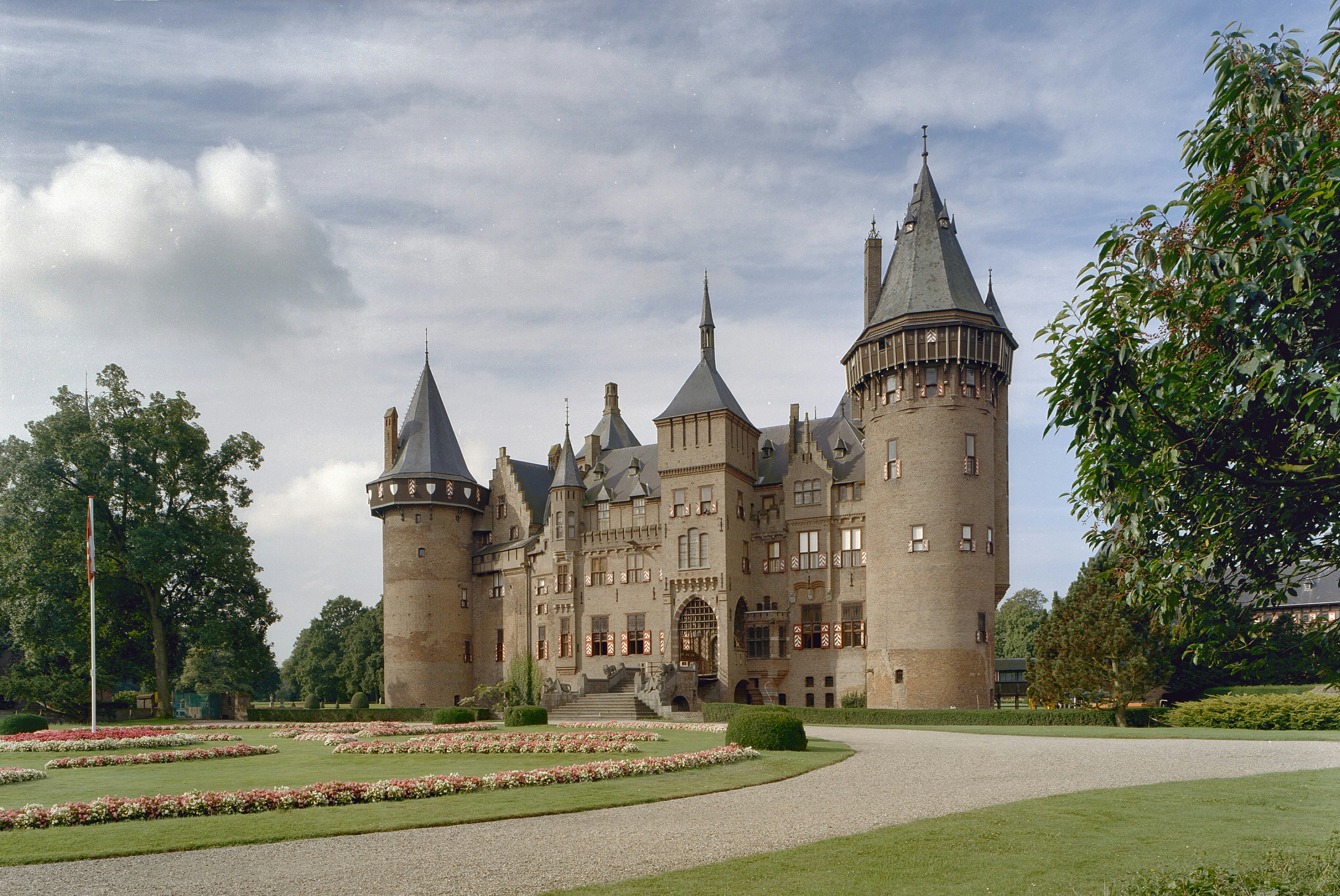 De Haar: Exterieur overzicht voorgevel